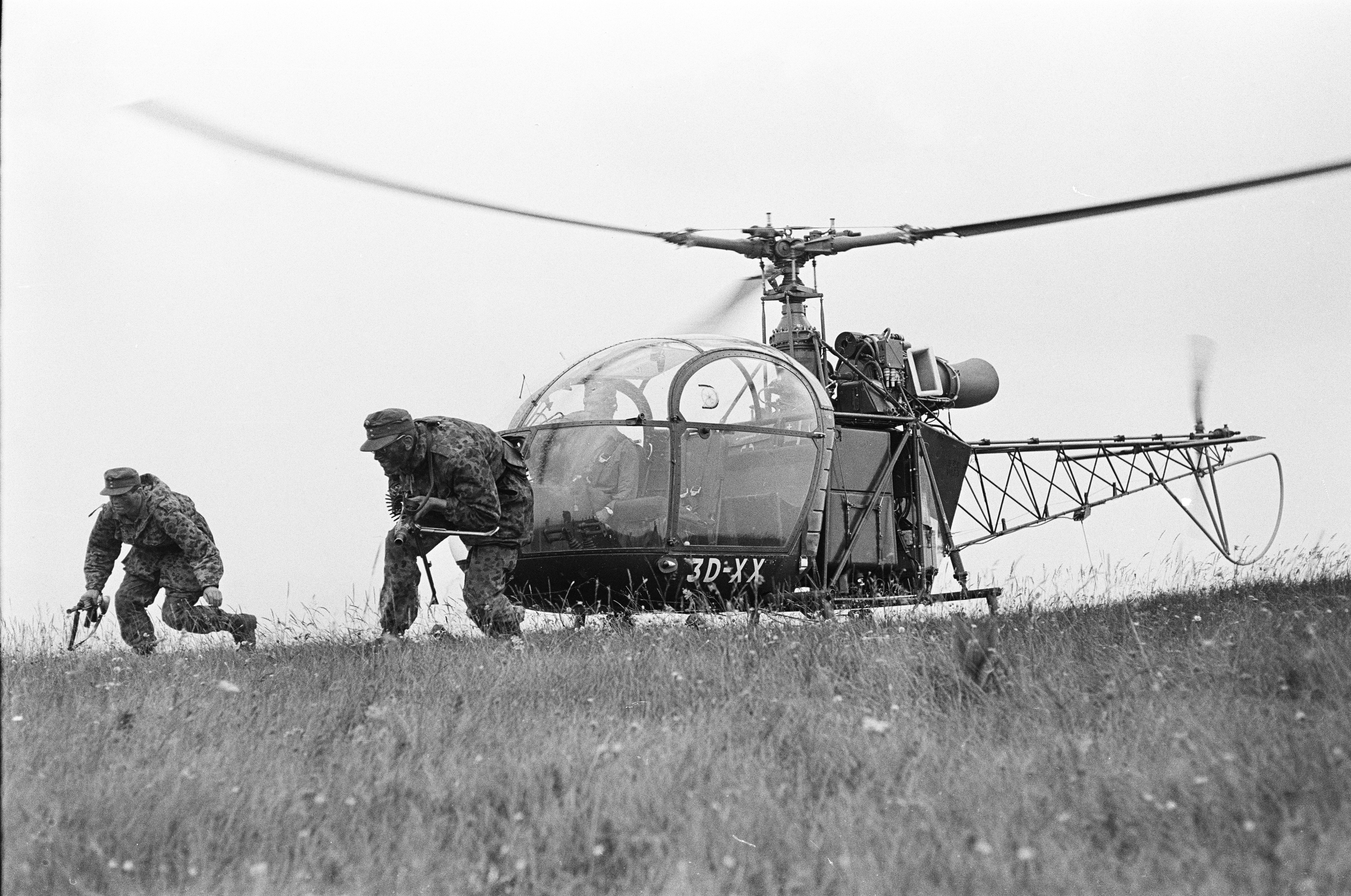 Übung der Militärakademie, 1963, Ramsau-Hainfeld.